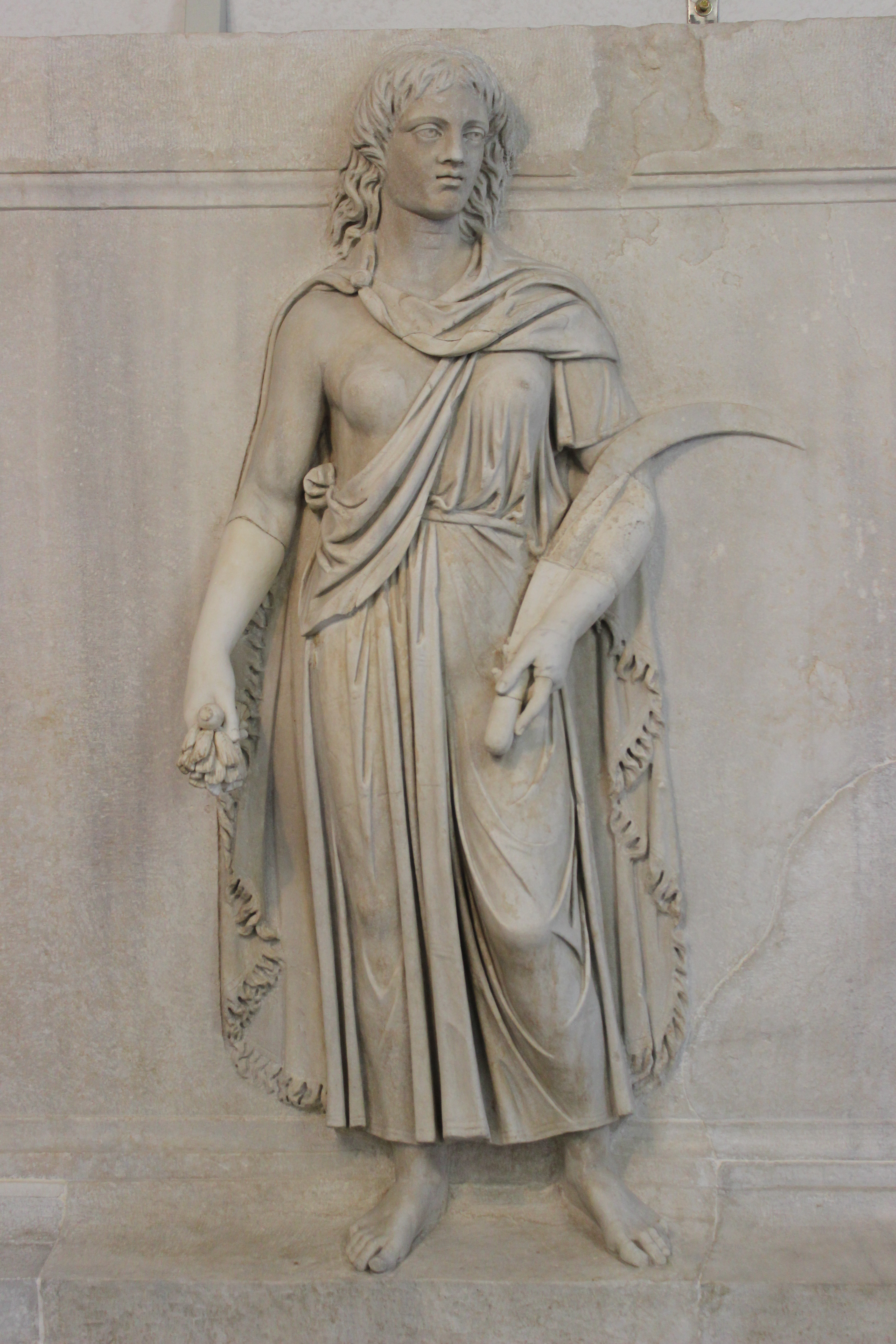 Roma. Palazzo Massimo alle Terme. Relieve con representación de Tracia. Procedente del Hadrianeum de Roma.